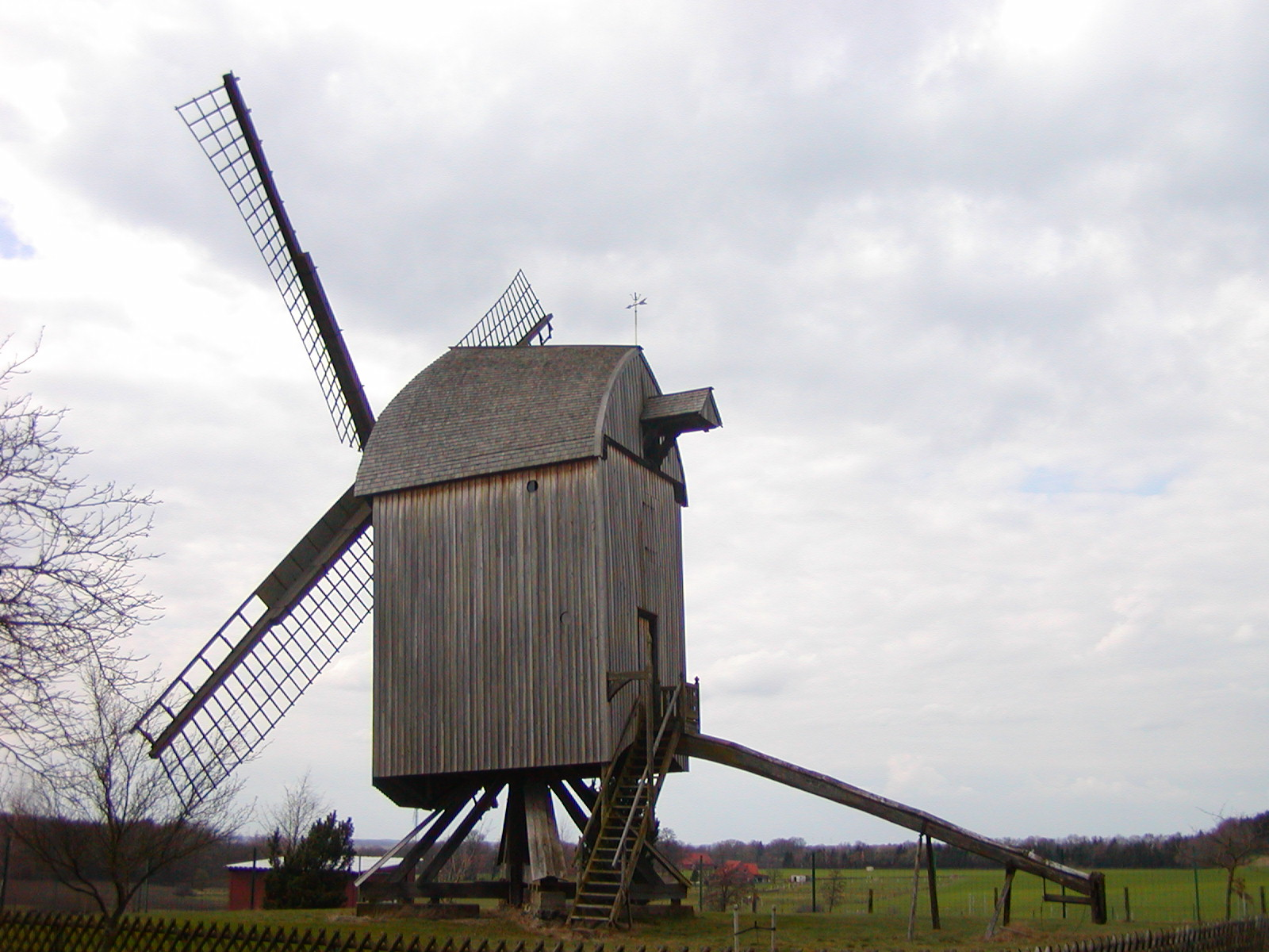 Bockwindmühle Neuenknick Sonstiges: ..